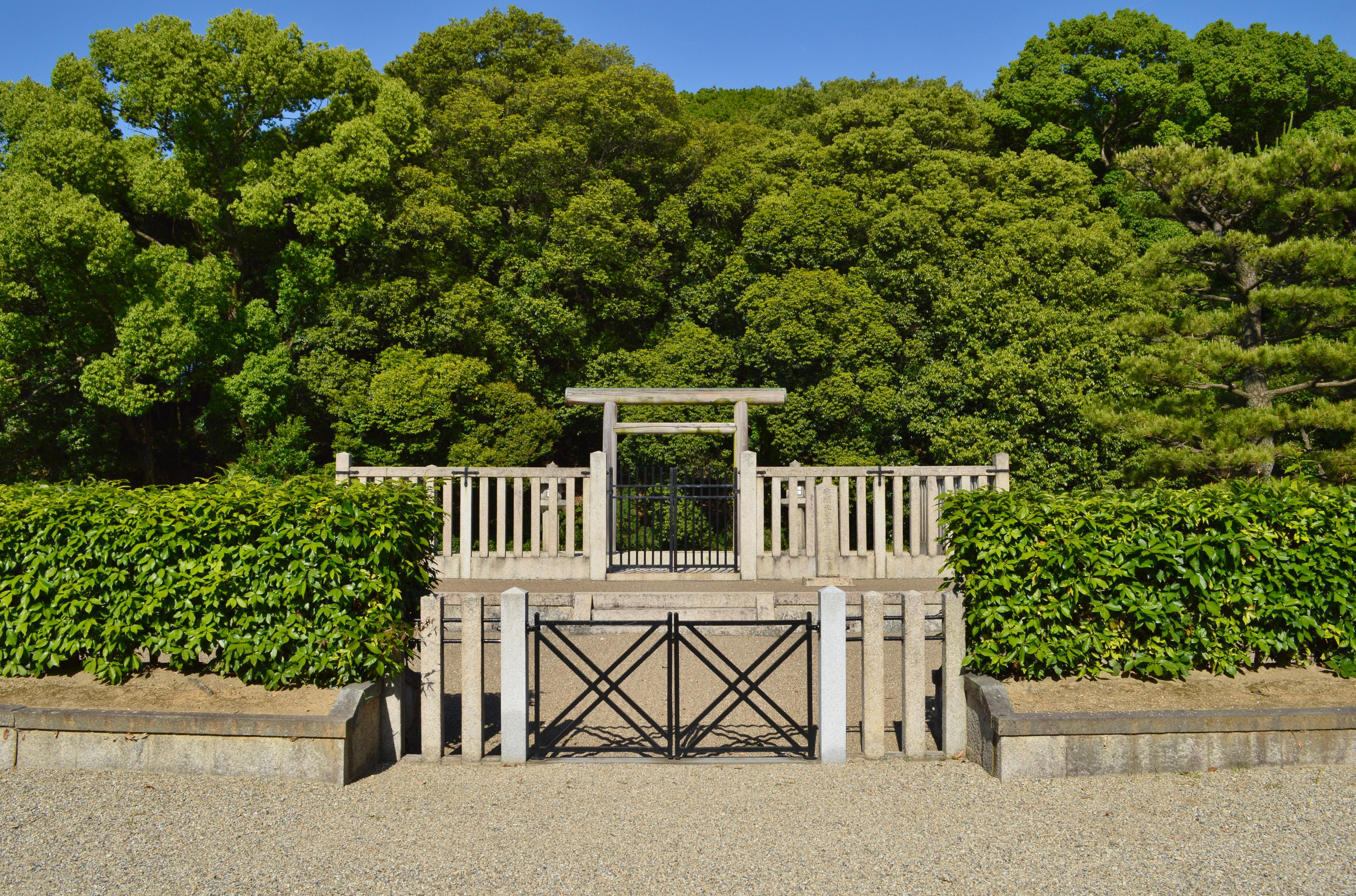 安閑天皇古市高屋丘陵・継体天皇皇女神前皇女墓 拝所